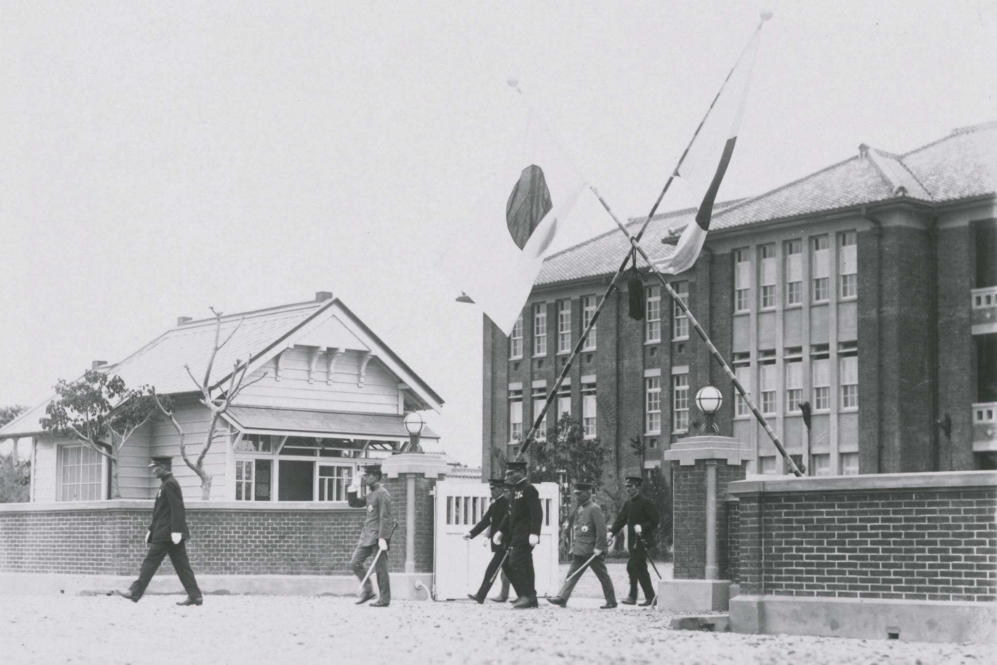 裕仁（左二）等步出臺灣總督府臺南師範學校。